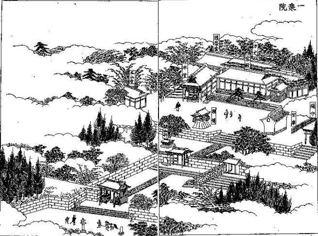 三国名勝図会第二十六巻「一乗院」